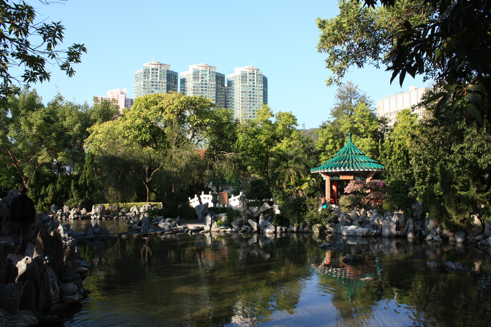 Lai Chi Kok Park Phase One 荔枝角公園第一期